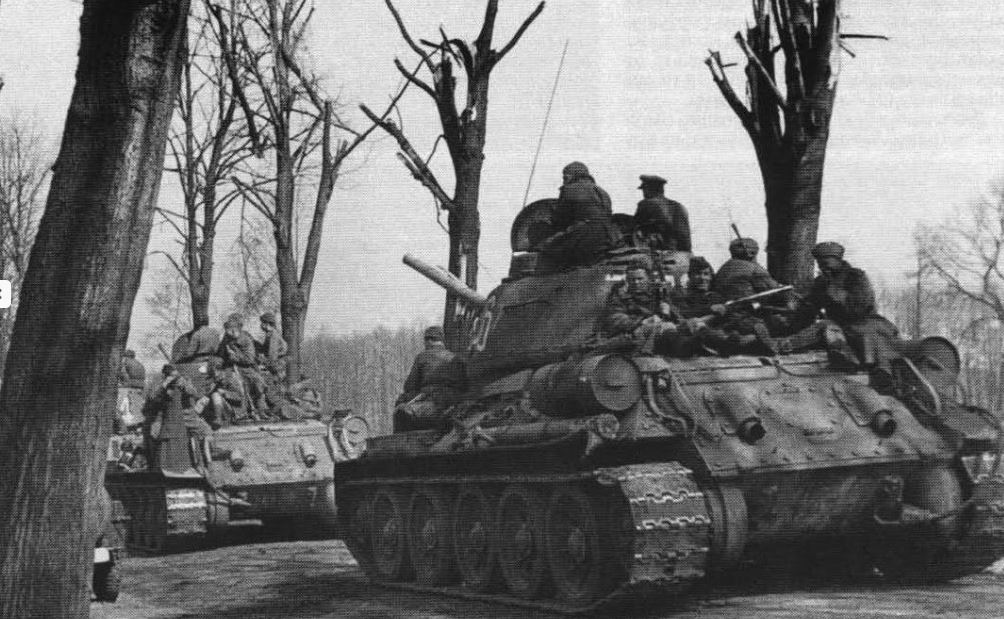 Carri armati della Seconda armata carri della Guardia in avanzata in Germania